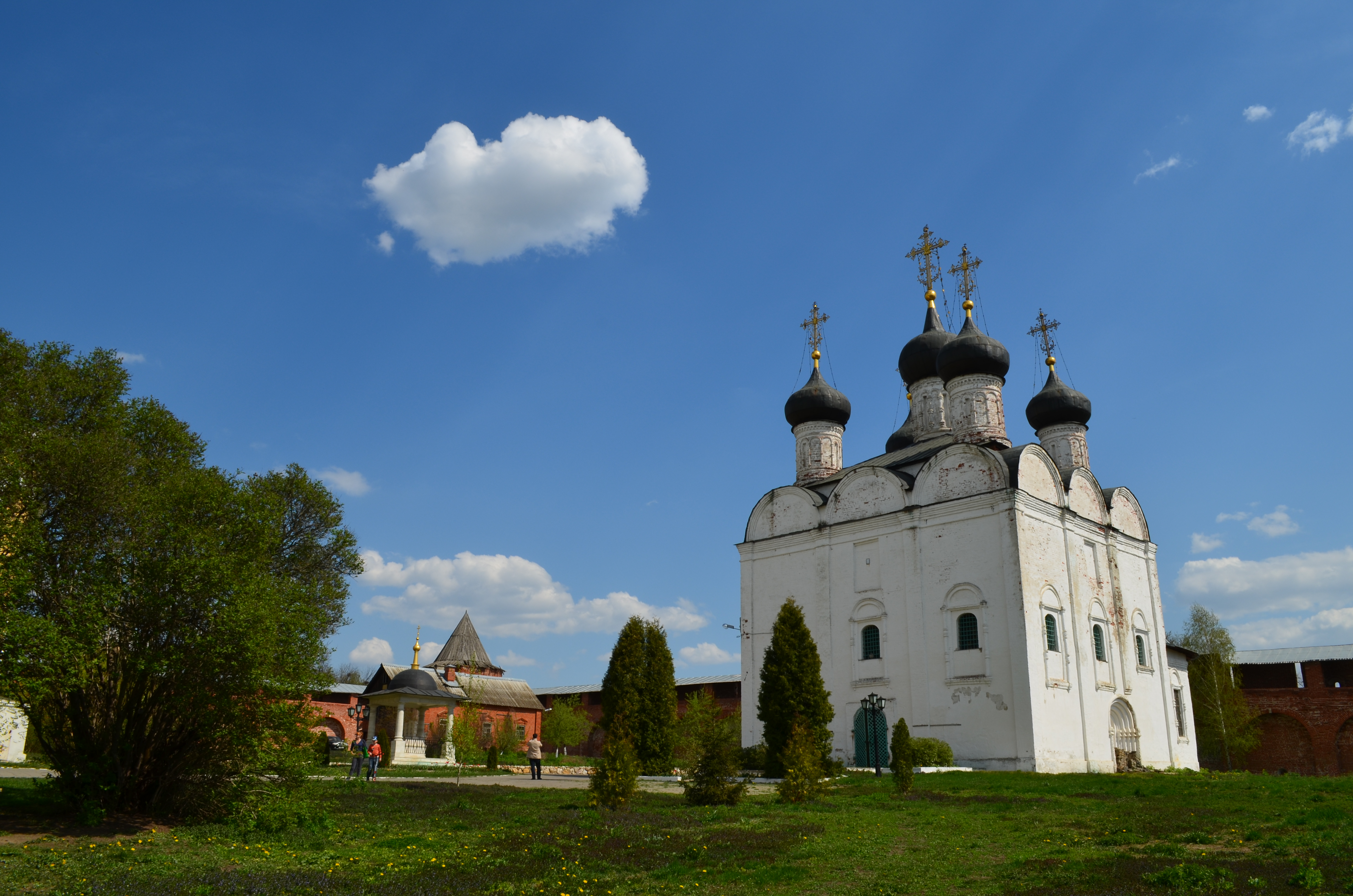 Зарайск.Кремль.Никольский собор.1681 г.